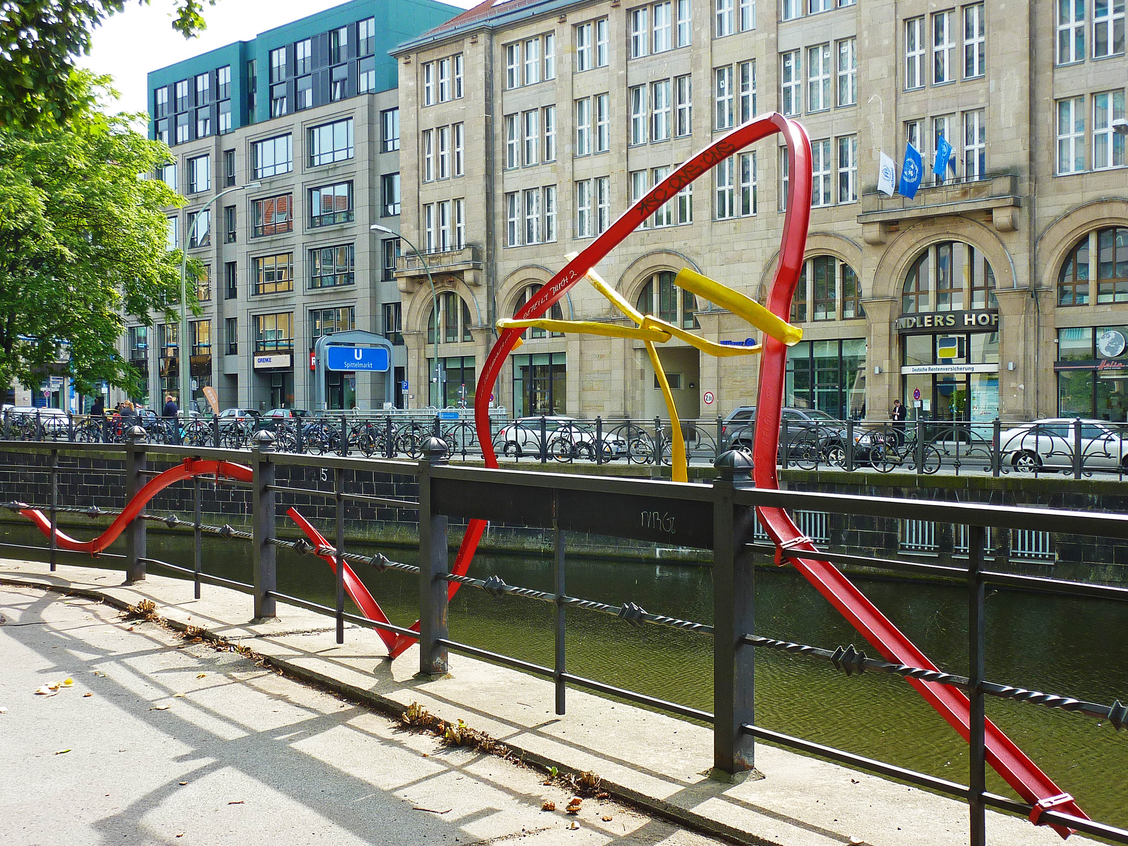 Installation 'Anmerkung' aus Baustahlträgern von Eduard Habicher aus dem Jahr 2010 auf der Fischerinsel am Spreekanal in Berlin-Mitte, gegenüber U-Bahnhof Spittelmarkt. Teil Habichers Wassergalerie 'Der Rote Faden am Hafen' entlang des Spreekanals.